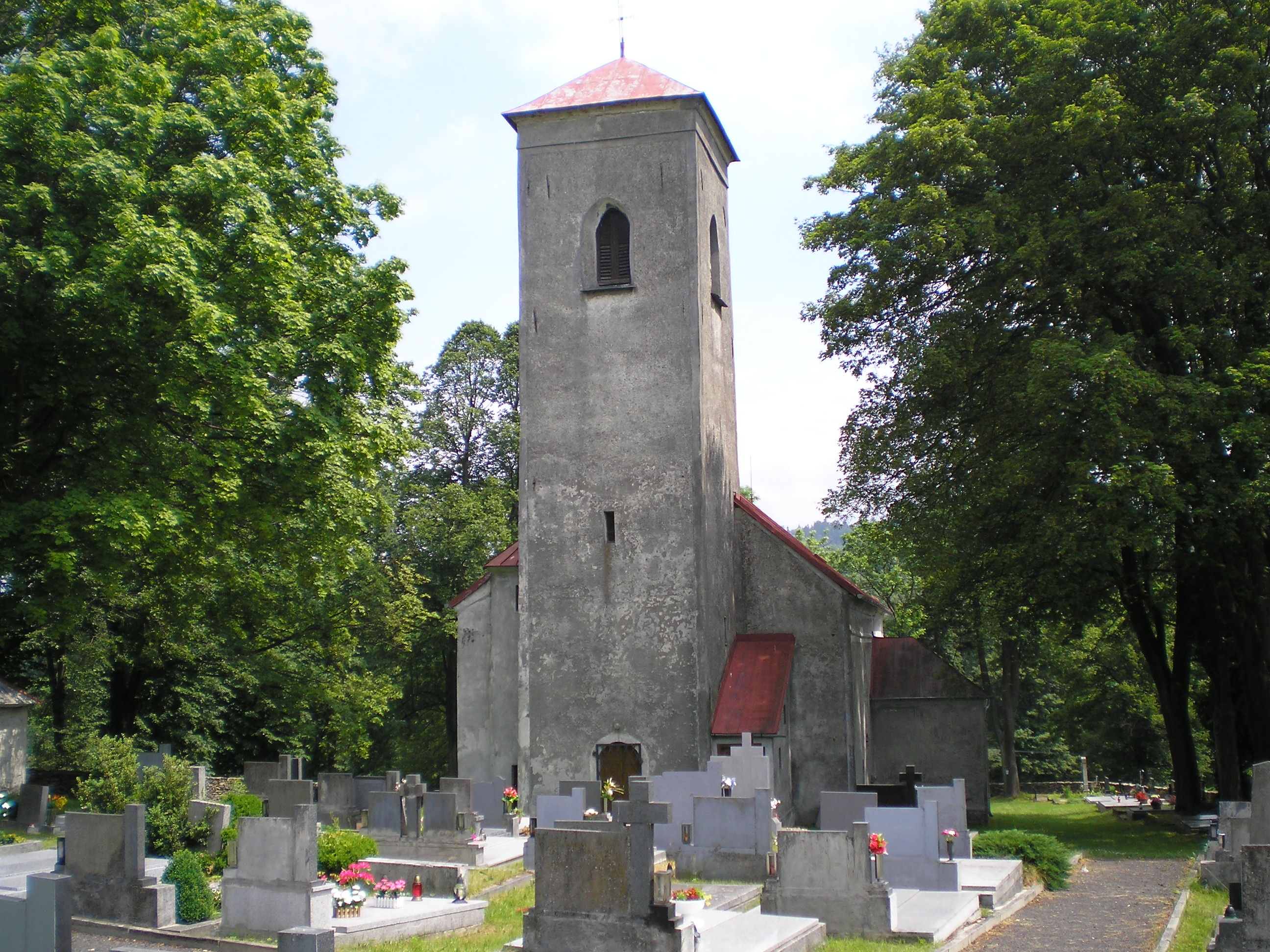 Lomnice, kostel sv. Jiří